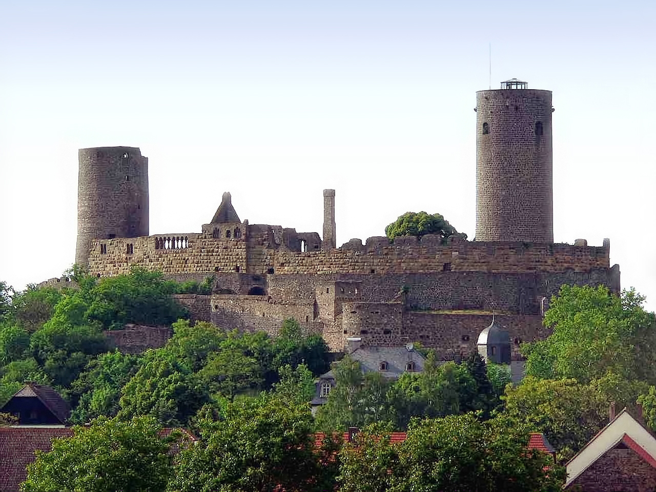 Burgruine Münzenberg, Hessen, Germany